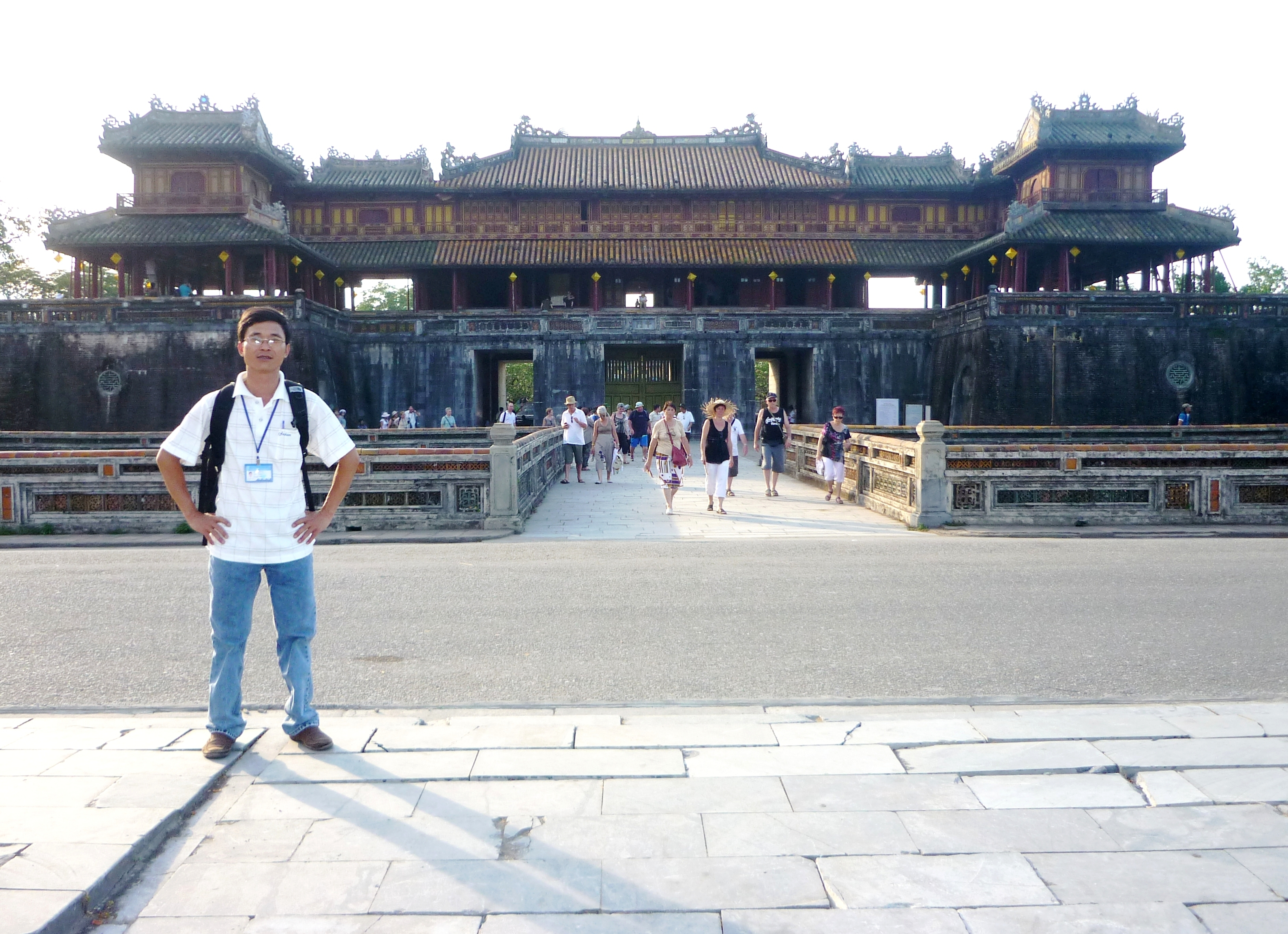 Thể loại:Du lịch Thể loại:Du lịch Huế Thể Loại:Di tích cố đô Huế Thể loại:Hướng dẫn viên du lịch